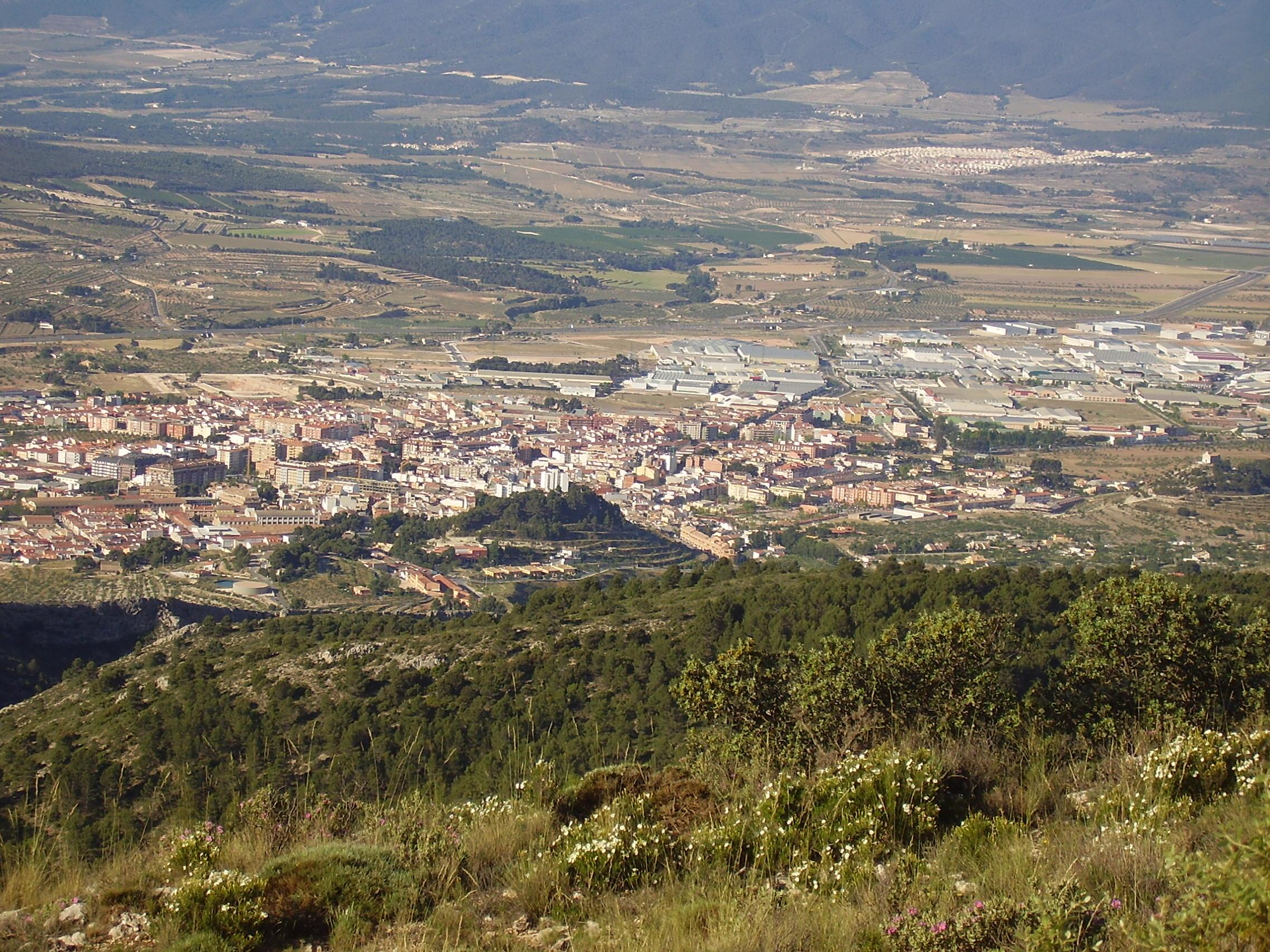 Ibi desde el Teixereta